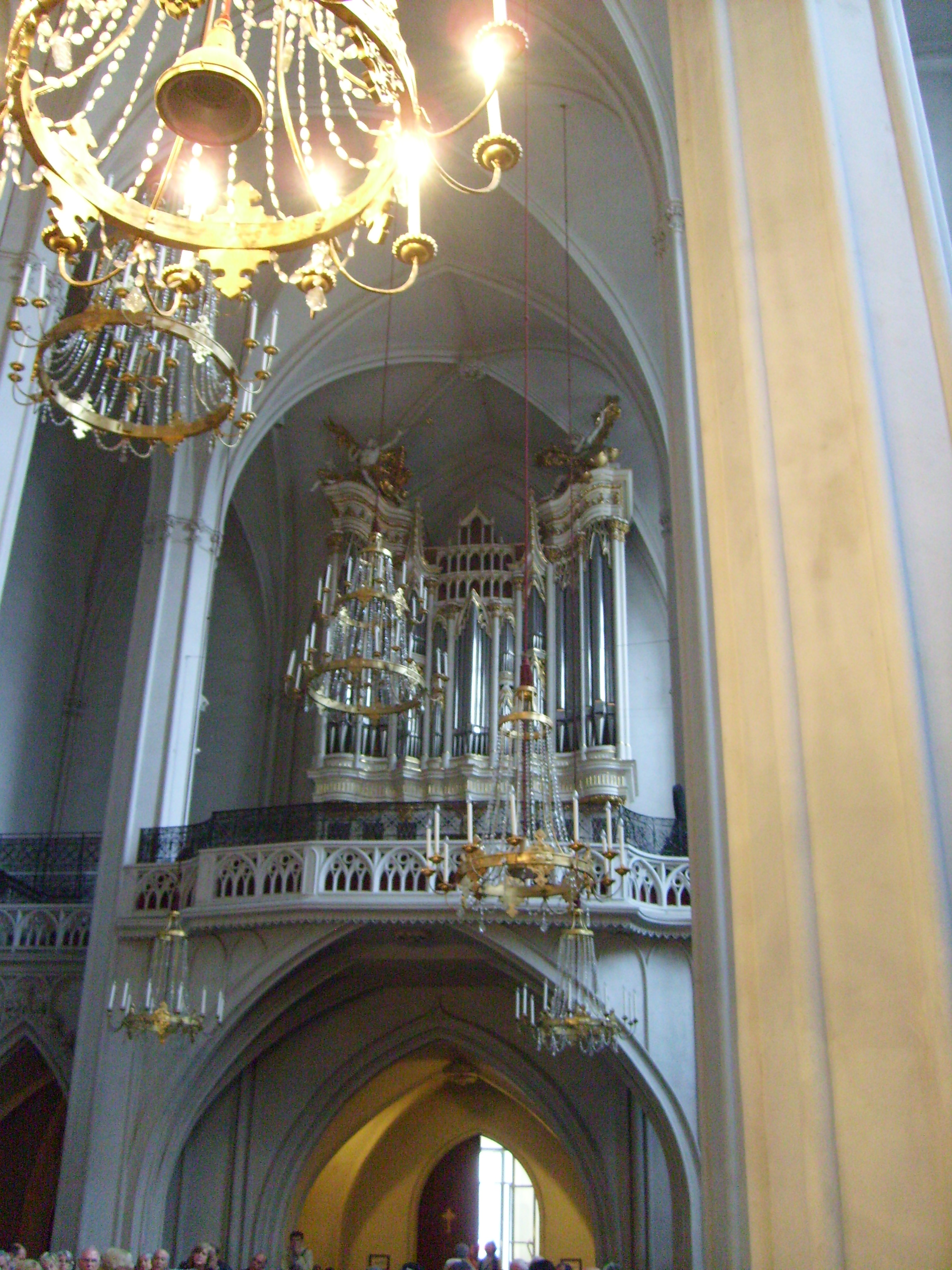 Orgel Augustinerkirche, mit originalem Gehäuse von 1730. Auf dieser Orgel spielte auch die blinde Komponistin, Pianistin, Sängerin und Musikpädagogin Maria Theresia Paradis. Aufnahme 2010.